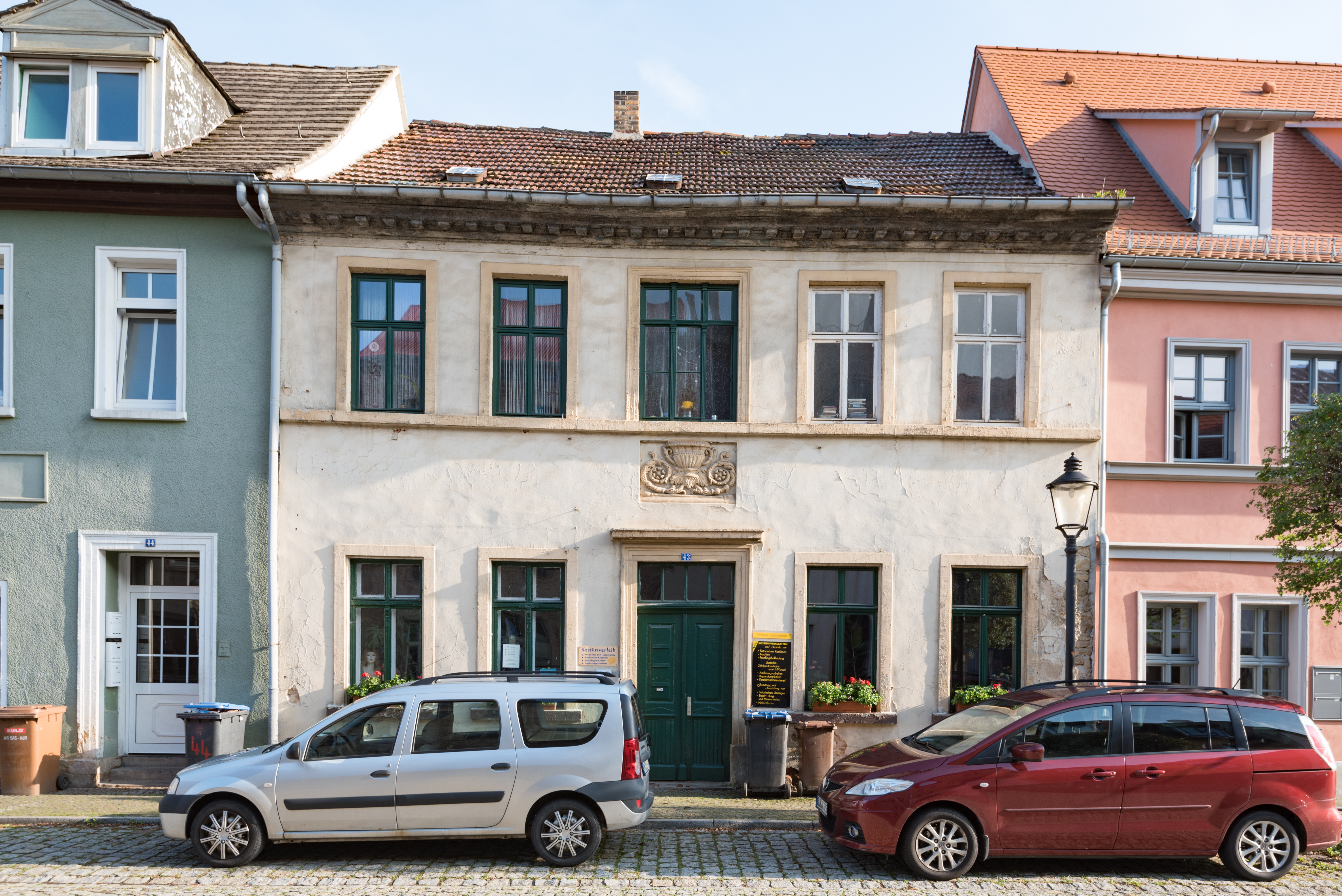 Naumburg (Saale), Neustraße 43